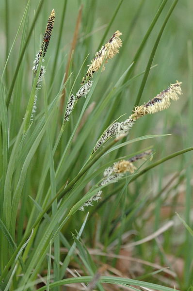 Picture taken in Commanster, Belgian High Ardennes . Species: Carex nigra